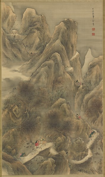 蜀桟道図